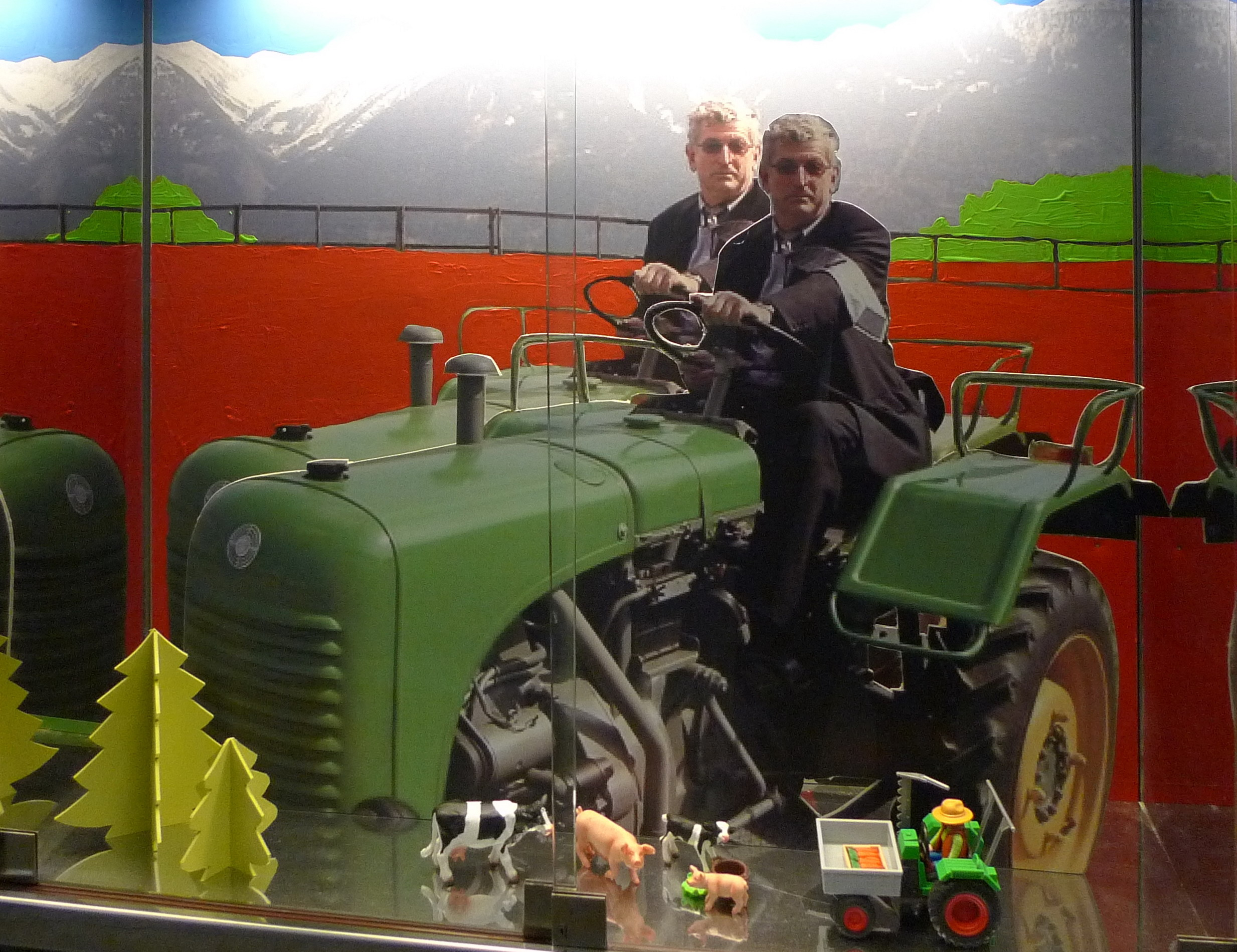 Josef Wilhelm 30.11.2010 Schaukasten 2; eigene Aufnahme des Autors; die schriftliche Genehmigung des Portraitierten zur Veröffentlichung des Bildes liegt dem Autor vor.